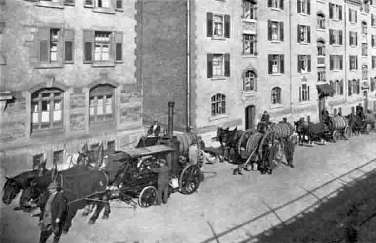 Einsatzzug der Latrinenanstalt Stuttgart vor den Häusern Türlenstraße 30–24, 1906. – Von links: Dampfpumpe, Schlauchwagen und mehrere Fasswagen.